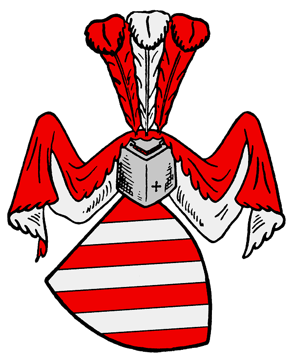 Stammwappen derer von Brünnow